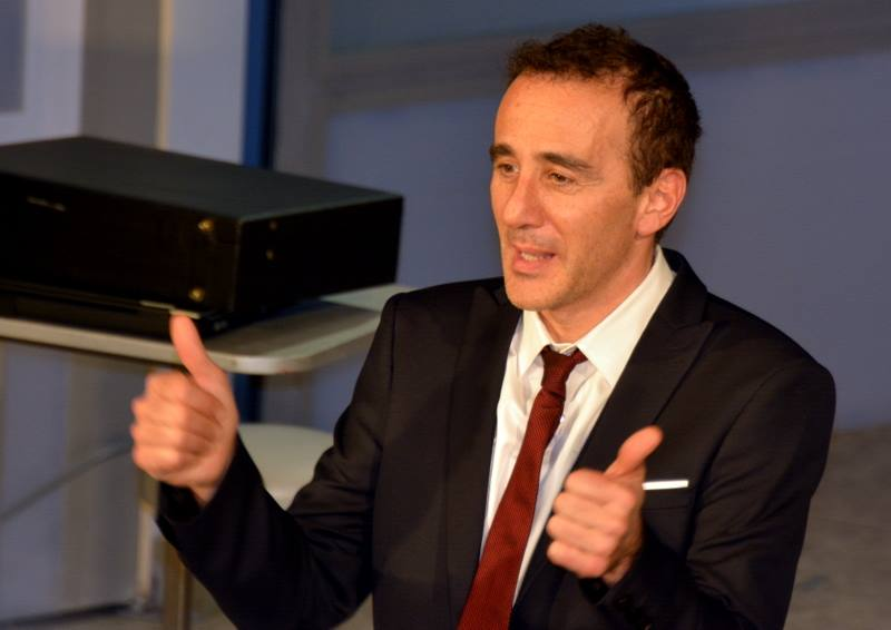 Elie Semoun sur scène à la fin d'une représentation de la pièce "Le Placard"